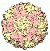 Image de la structure du polyovirus depuis diffraction X. PDB ID: 2PLV.